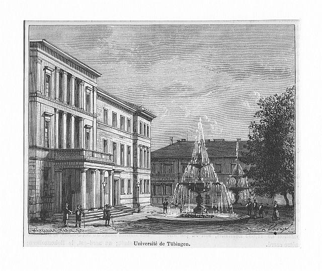 Neue Aula in Tübingen (Holzstich 11 × 14 cm)